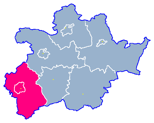 Locator maps for communes in województwo zachodniopomorskie : Pełczyce gm.png (podział na gminy)